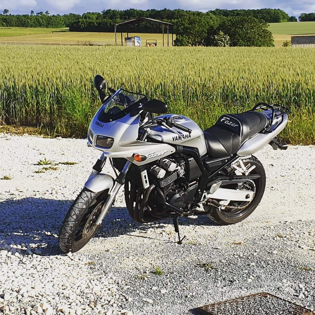 Photo du modèle 1999 de yamaha fazer ( fzs600)